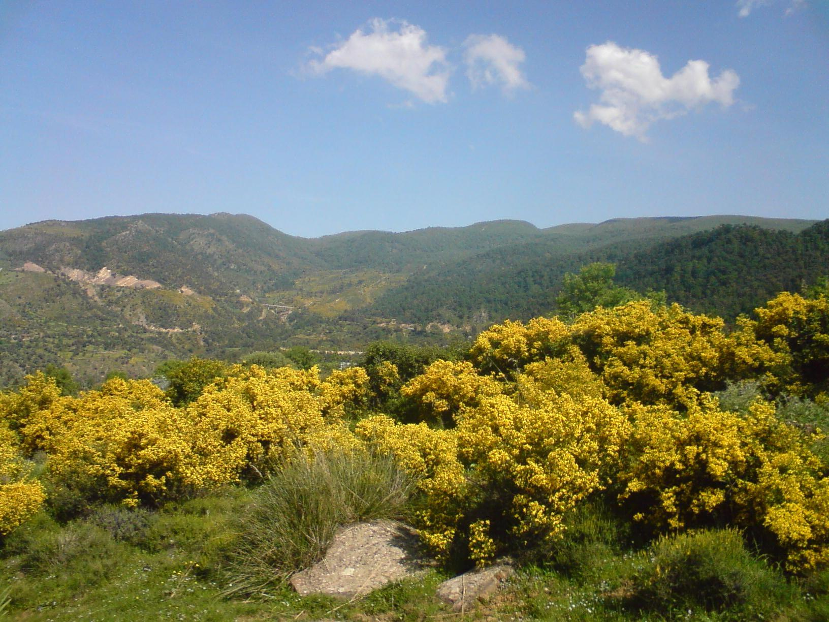 Paysages de Kabylie depuis le village d'Assif El Hammam (Adekar, Algérie).